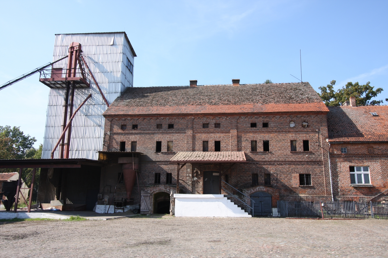 Wielichowo, gorzelnia, w zespole folwarcznym, mur., kon. XIX